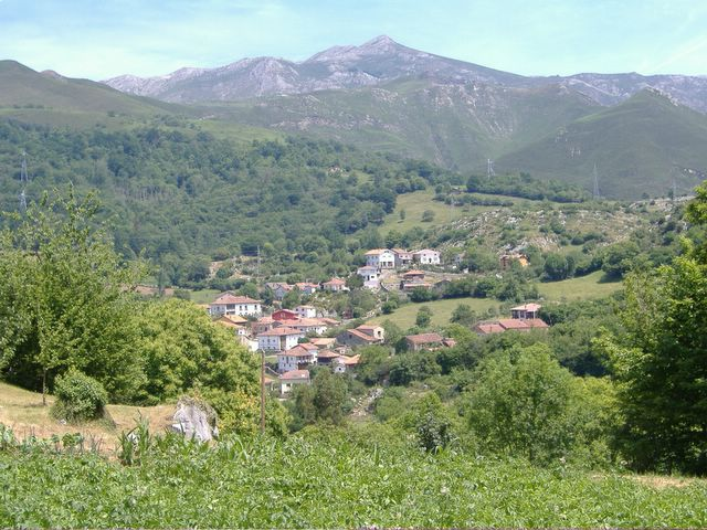 vista de puertas camín del cimenteriu.